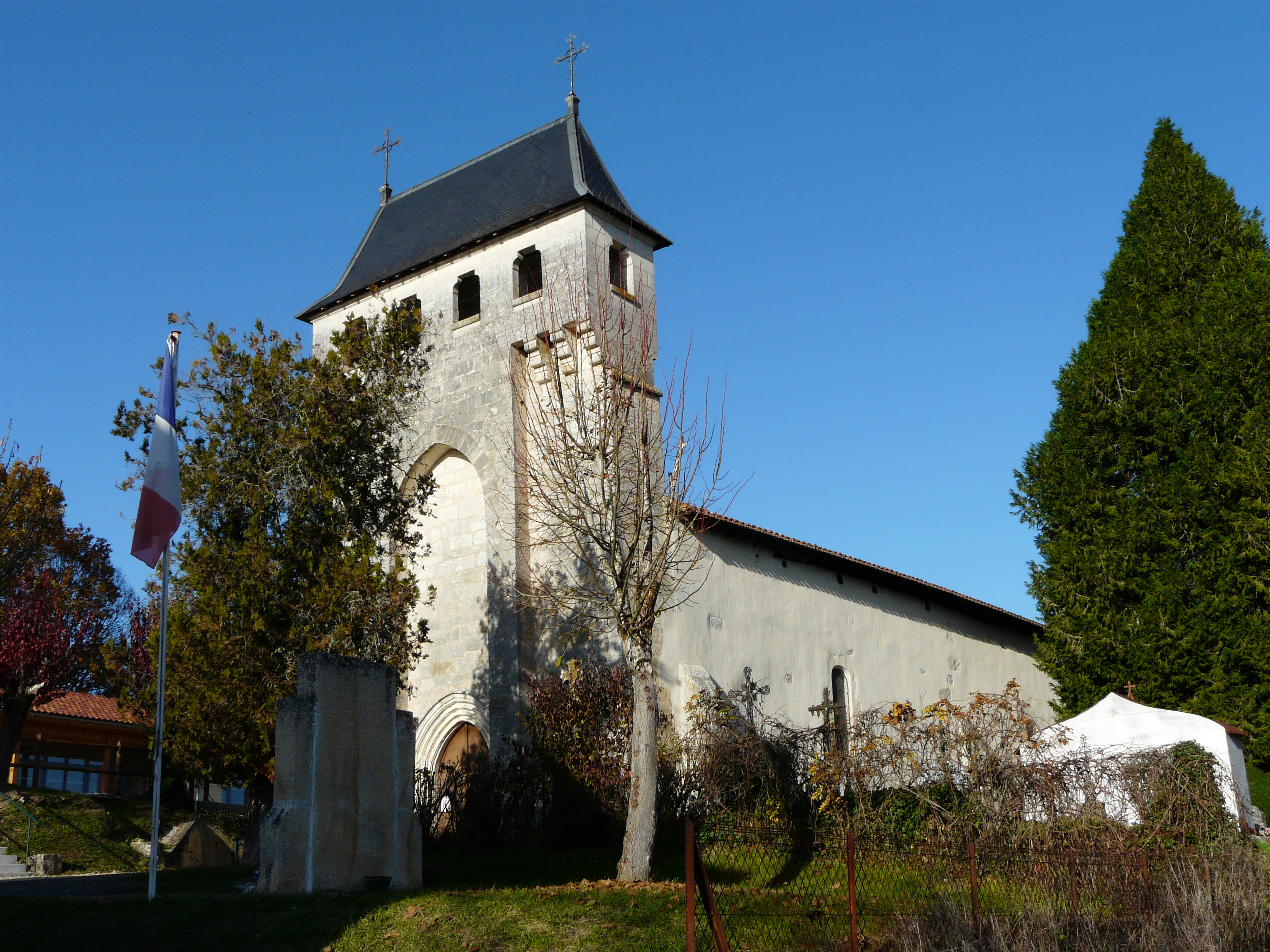 L'église Saint-Antoine de Saint-Antoine-d'Auberoche, Dordogne, France.